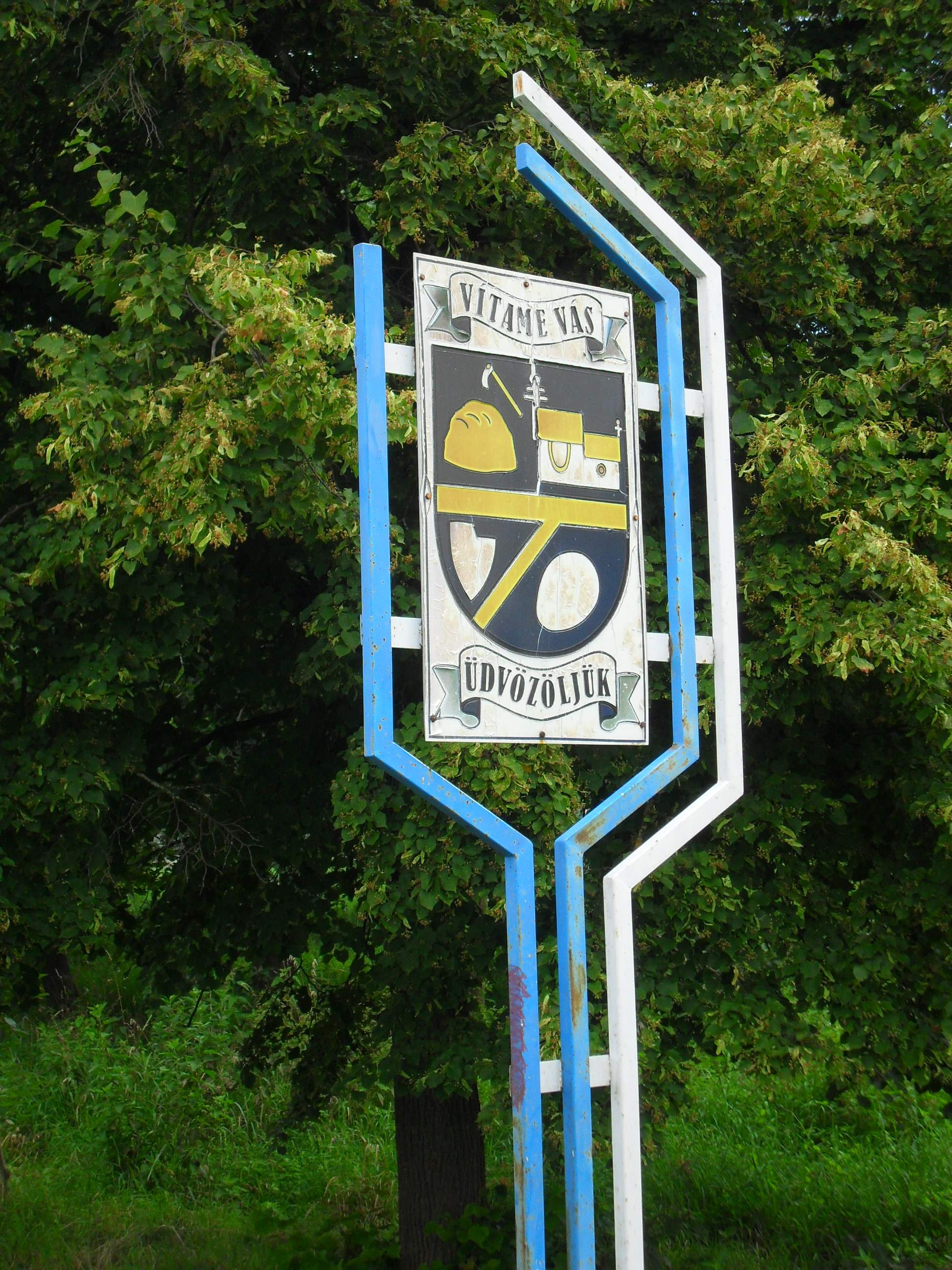 Nagybalog - címeres üdvözlőtábla